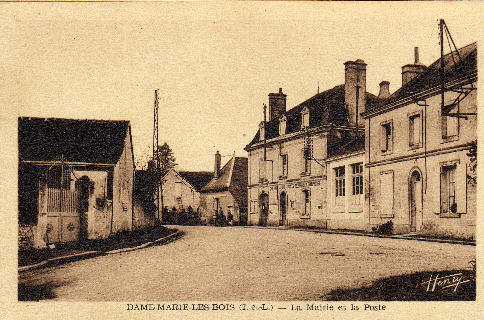 Mairie et bureau de poste de Dame-Marie-les-Bois (début XXe siècle)